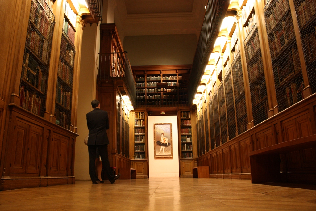 Bibliothèque-Musée de l'Opéra National de Paris